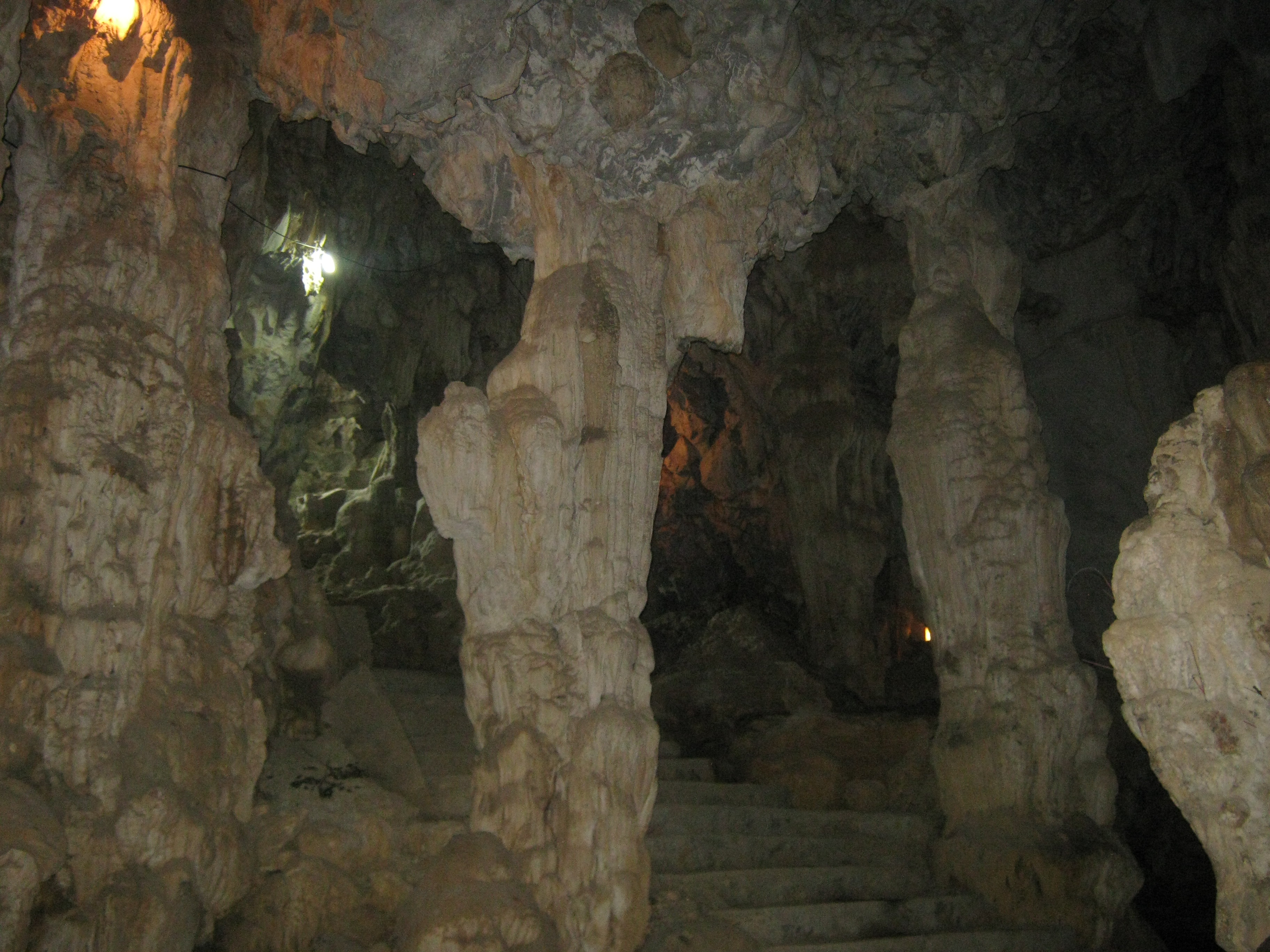 Chùa Địch Long tại Ninh Bình.